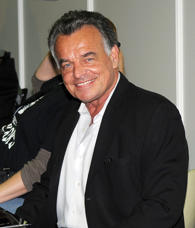 Ray Wise auf der 9. Weekend of Horrors in Bottrop (NRW)